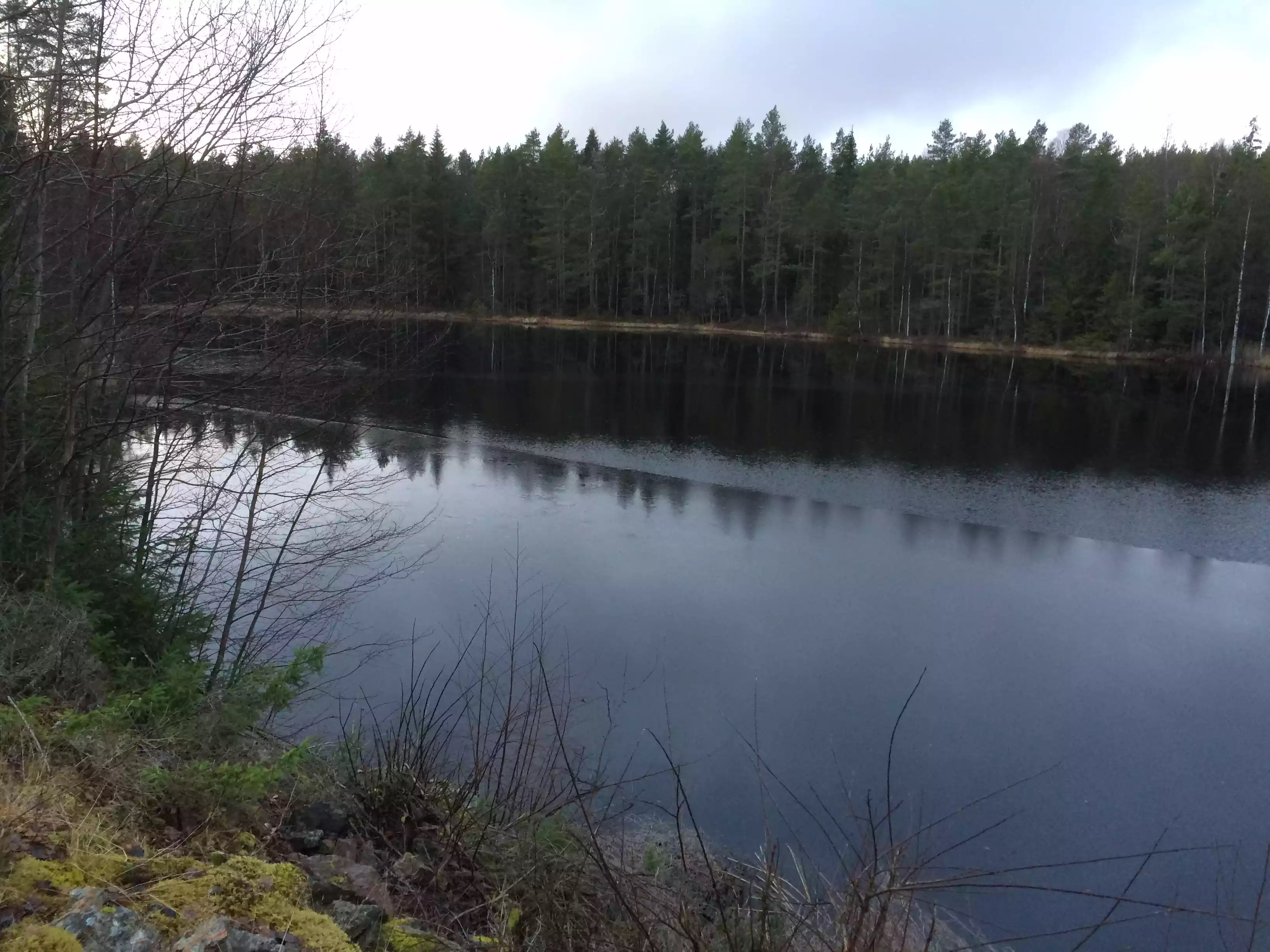 Kvernhustjennet i Aurskog-Høland kommune.